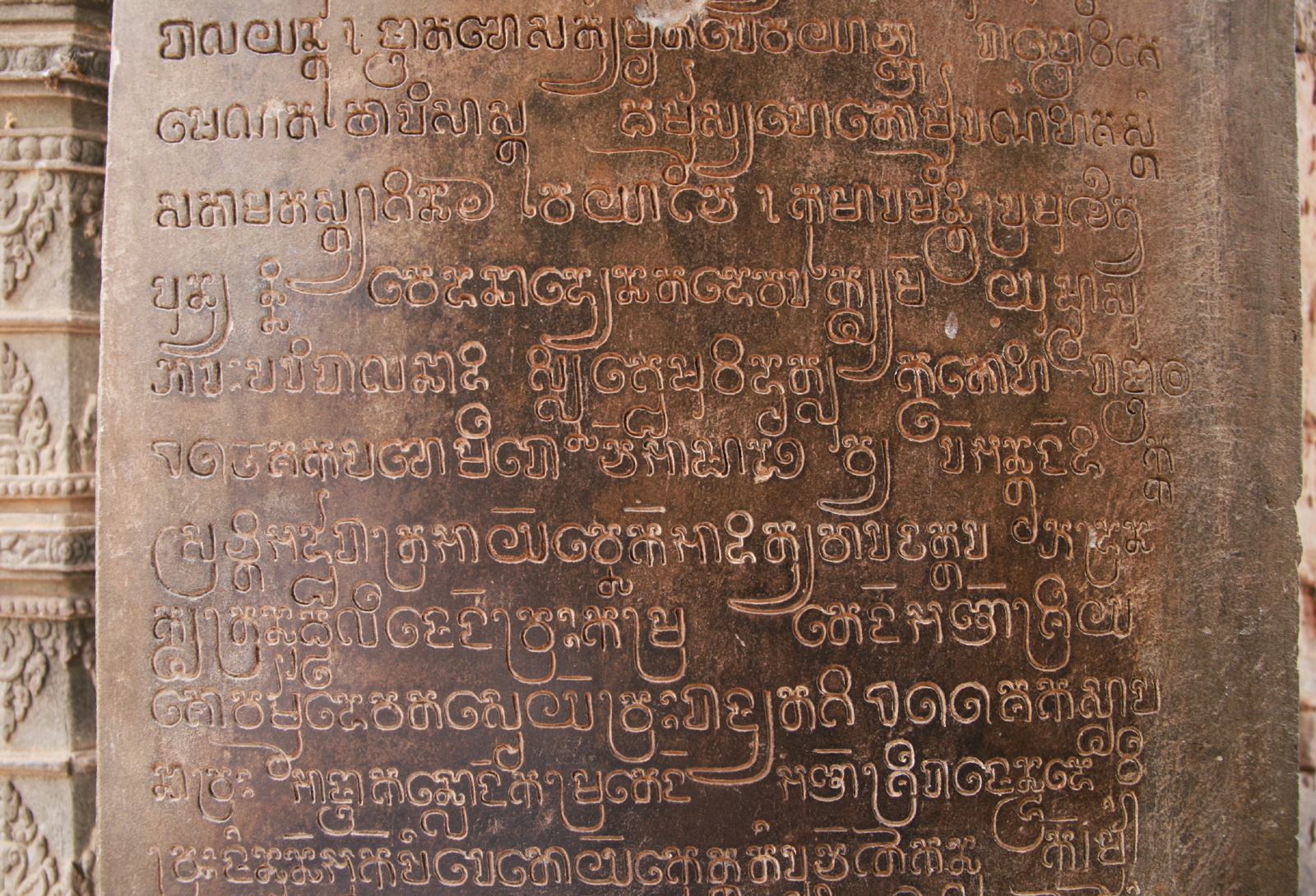 Temple de Lolei au Cambodge